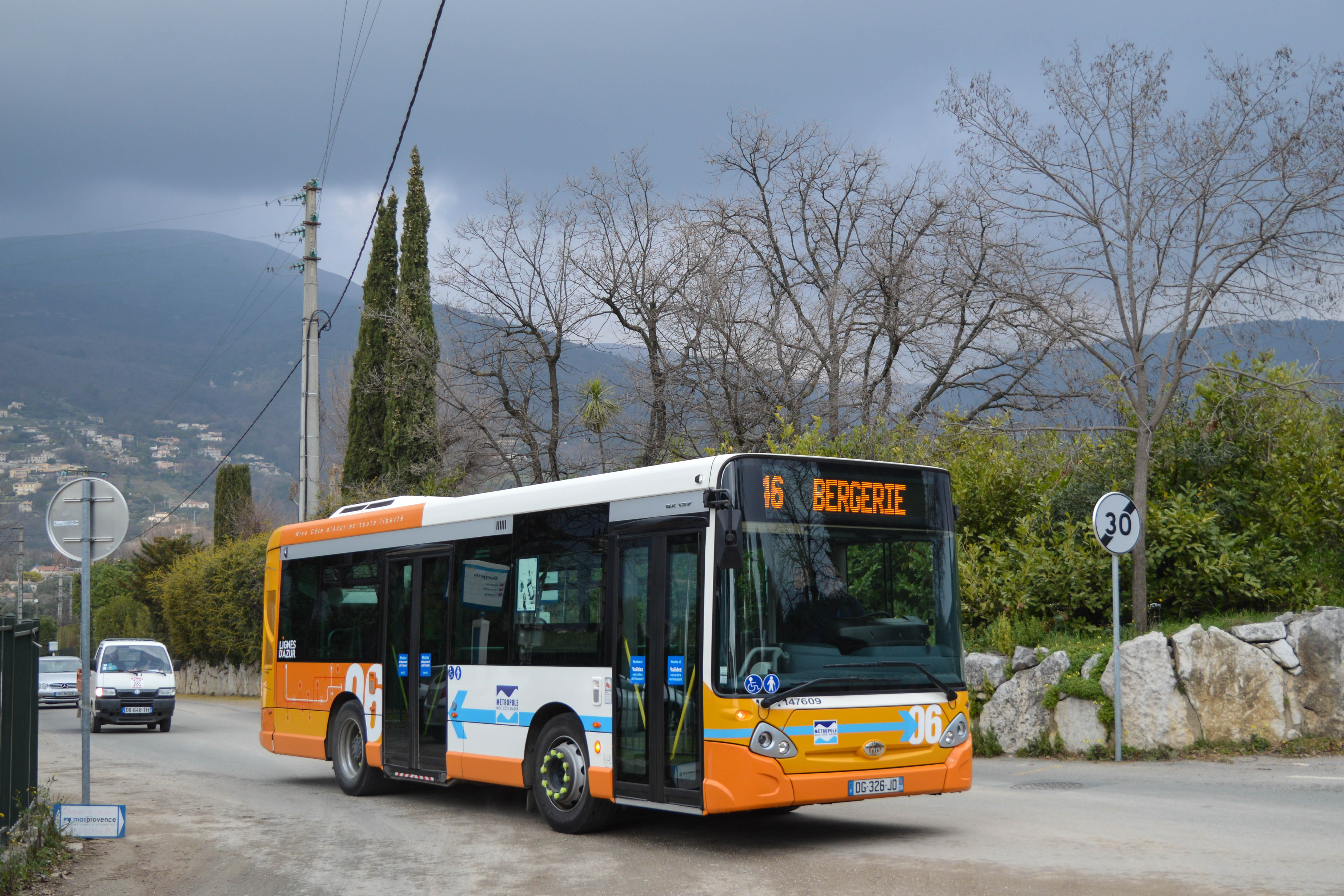 Heuliez GX137 KBA